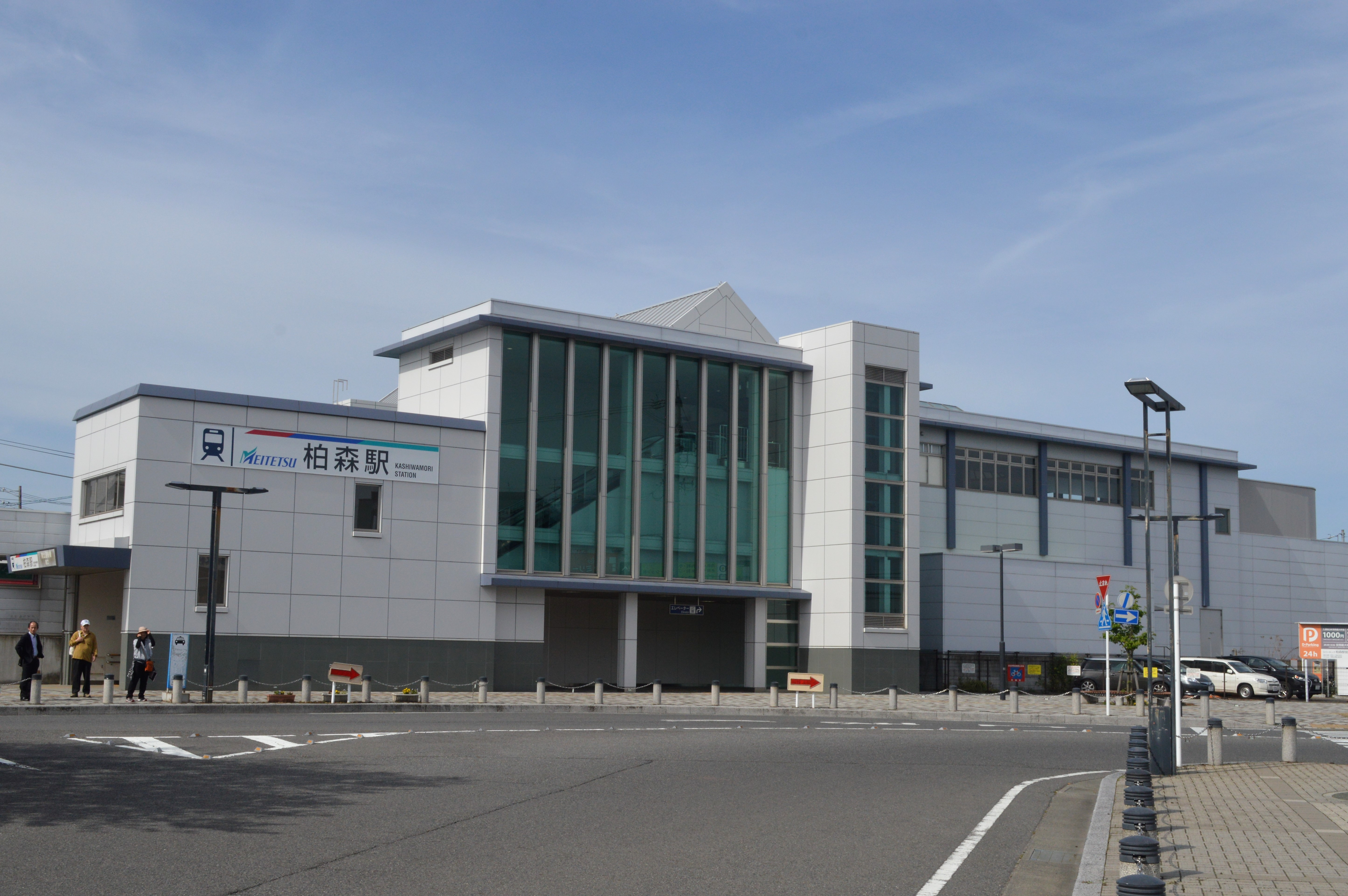 名鉄犬山線柏森駅。